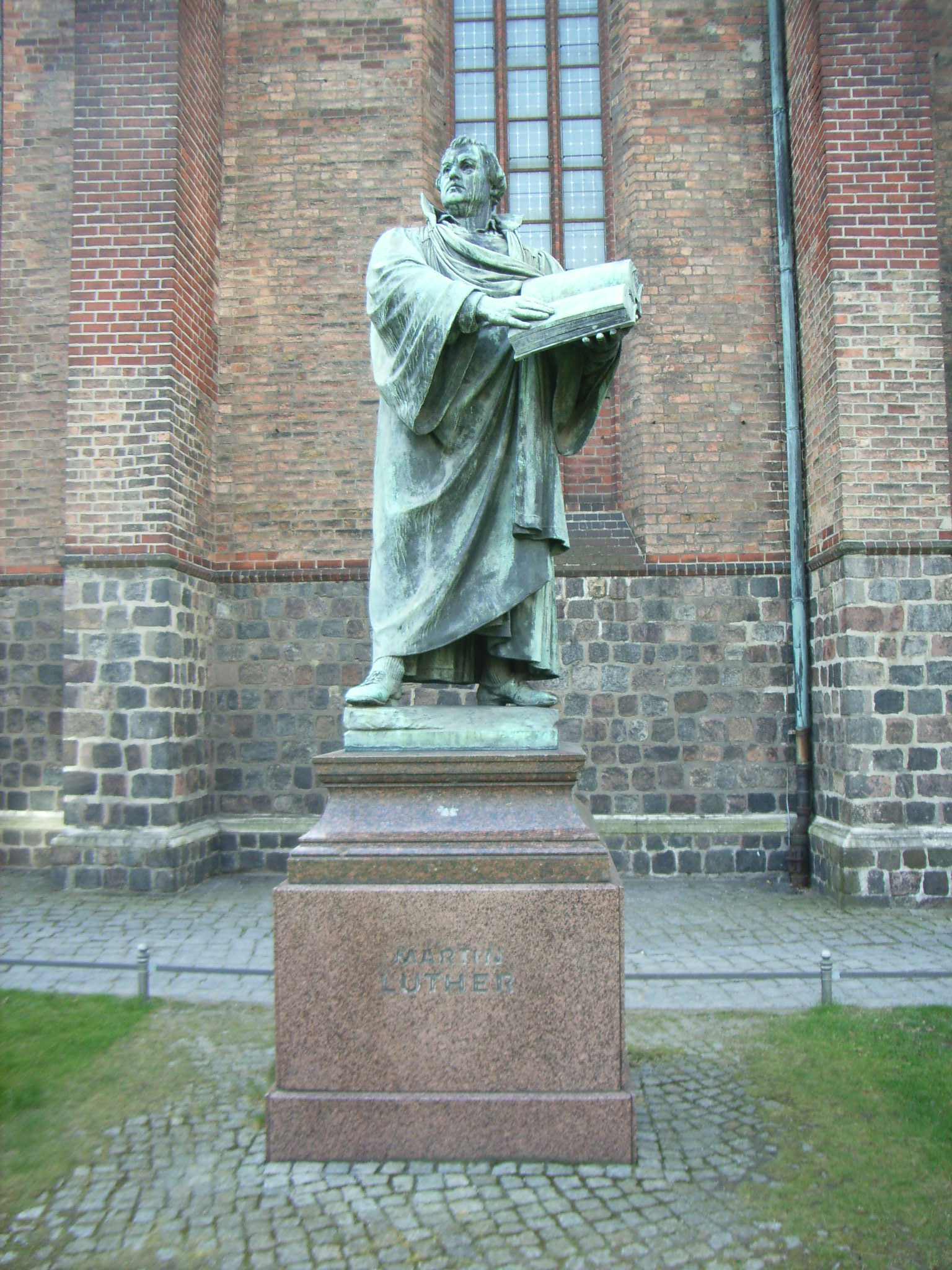 Martin Luther-Denkmal an der St. Marienkirche in Berlin, begonnen von Paul Otto, vollendet von Robert Toberentz 1895